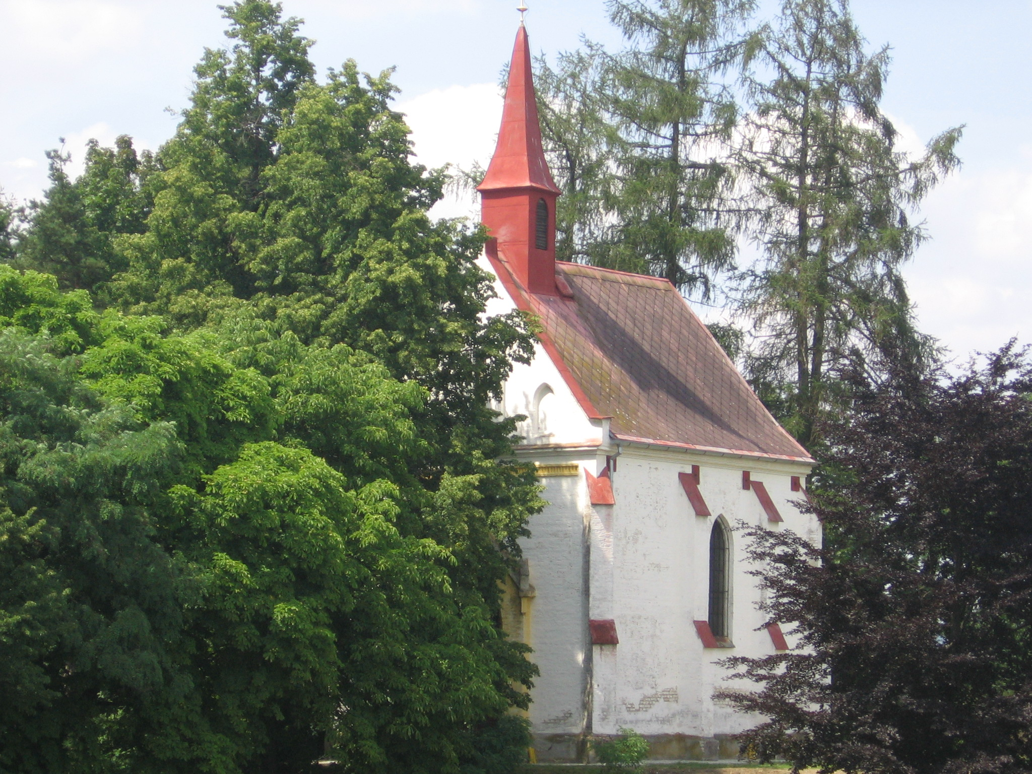 Kaple sv. Felixe, Klenová, okr.Klatovy